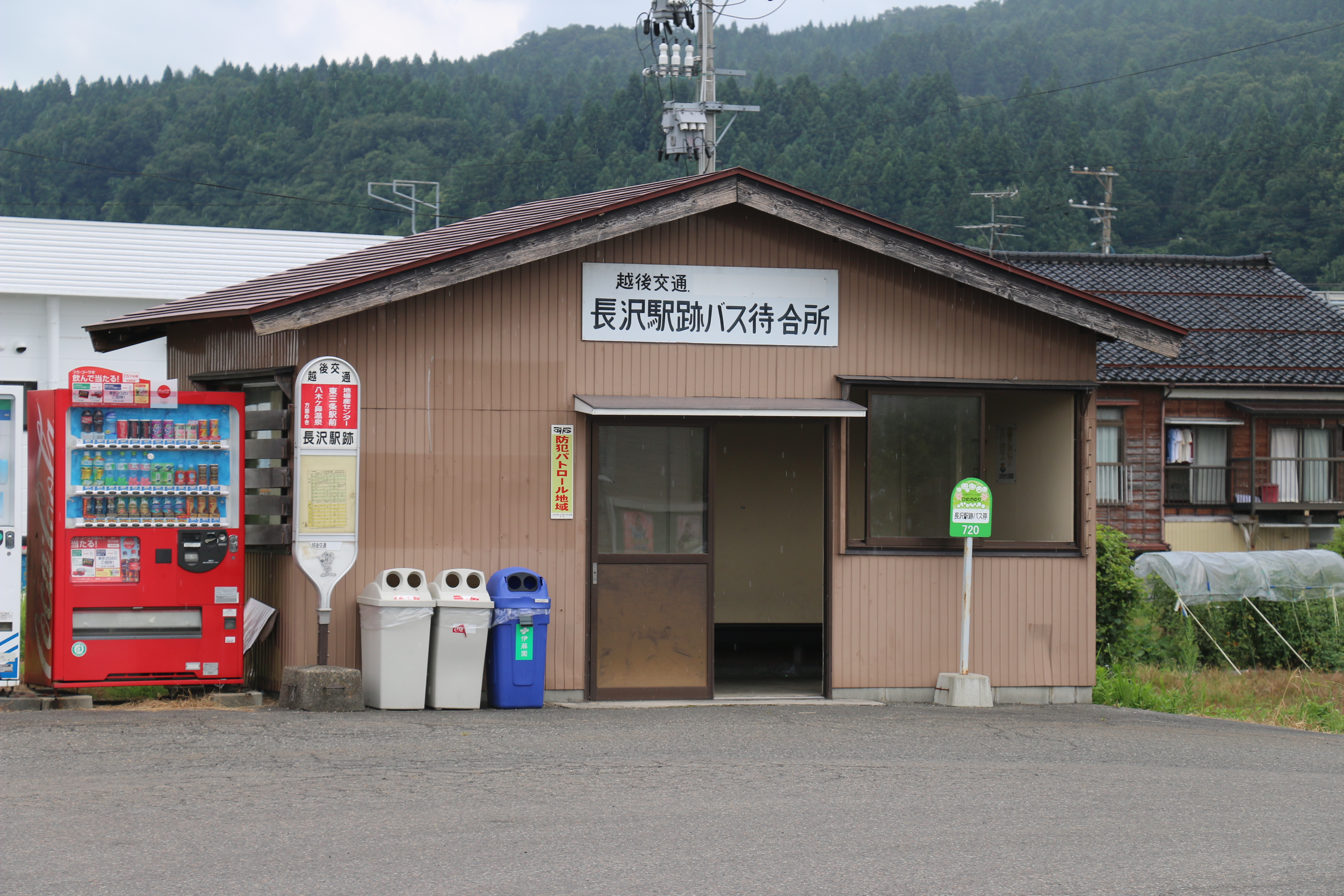 長澤駅跡バス待合所